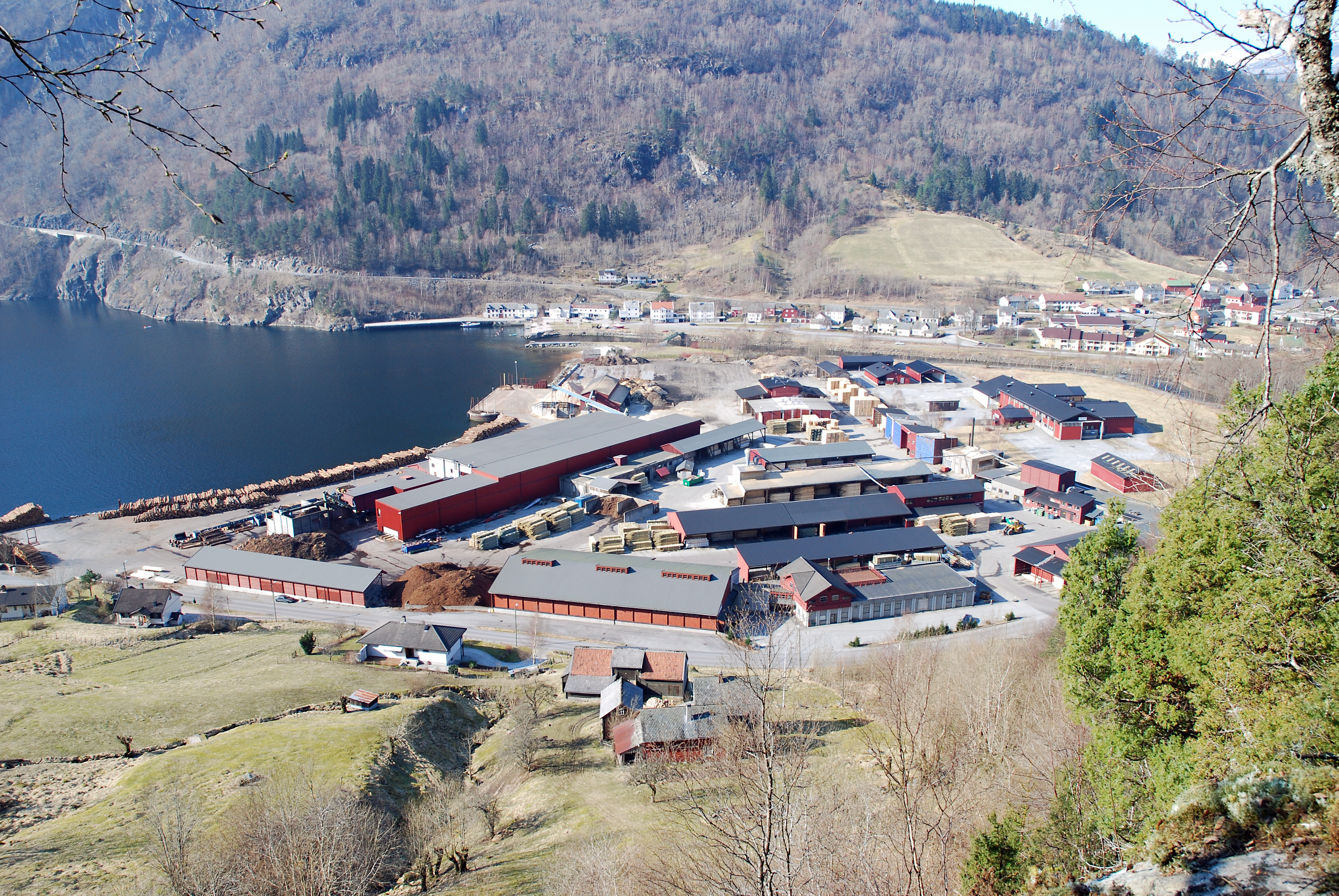 Granvin bruk, in Granvin, Hordaland, Norway.